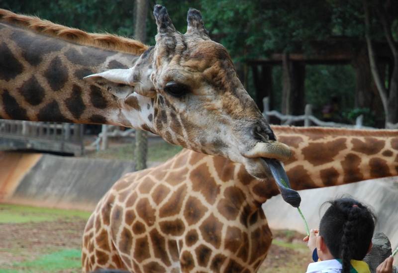 กระโหลกส่วนหน้าผากจะมีแคลเซี่ยมมาสะสม ทำให้ส่วนดังกล่าวมีก้อนแข็งเล็กๆ พอกตัวขึ้น